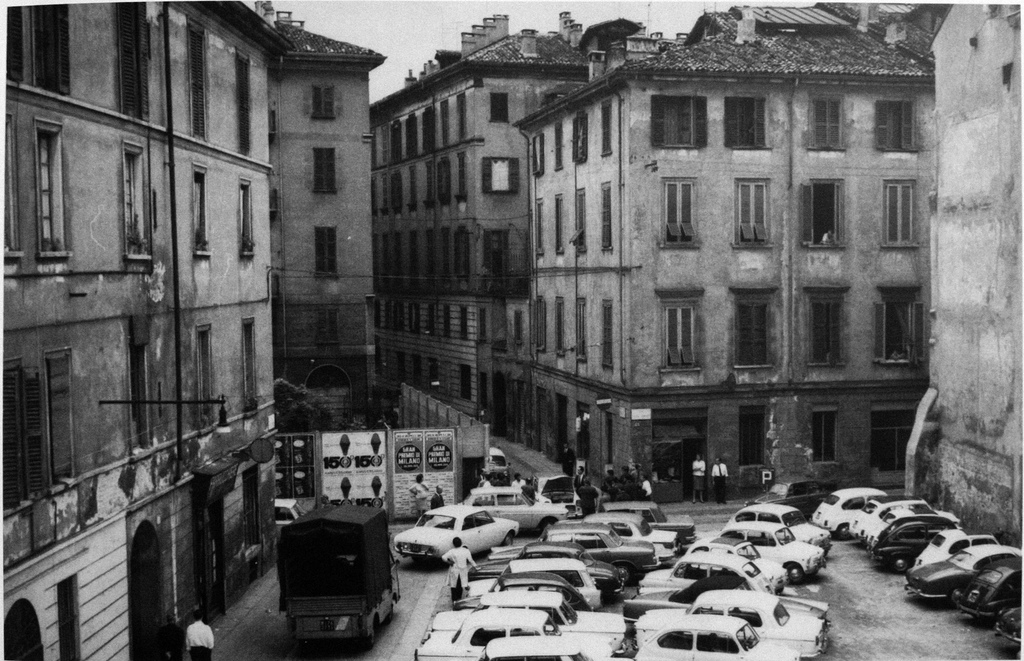 Milano, via Fiori Chiari a Brera invasa dalle auto